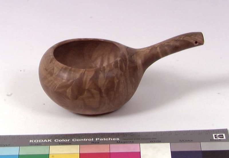 Nord-samisk nahppi skåret av Ole Triumf. Foto Norsk Folkemuseum, NFSA.4372.